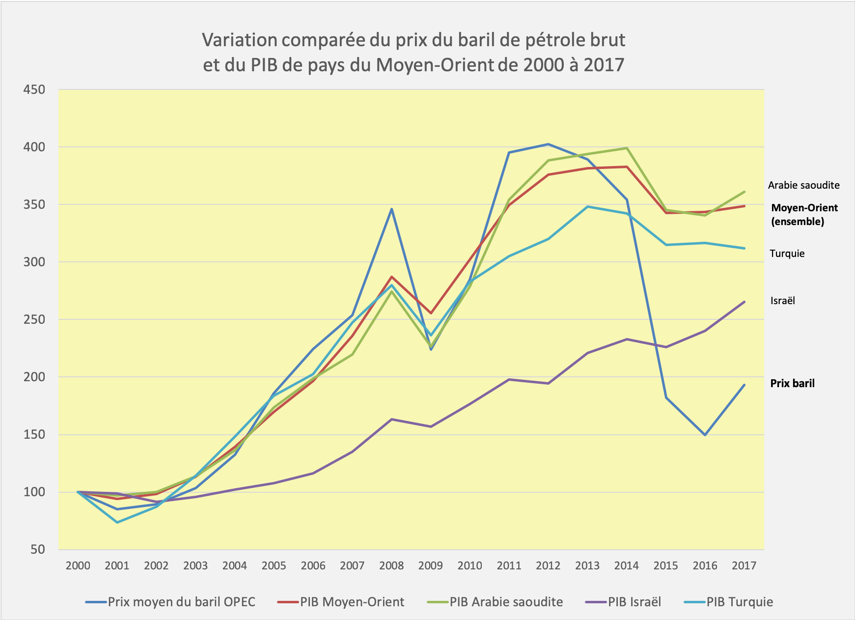 Ce graphique représente l'évolution comparée entre 2000 (base 100) et 2017 du prix du baril de pétrole brut OPEP et du PIB de l'Arabie saoudite, de la Turquie, d'Israël et de l'ensemble des pays du Moyen-Orient en US$ courants. Les données sont extraites des bases de données de la banque mondiale pour le PIB ( et de la base de données Statista pour le prix du baril (